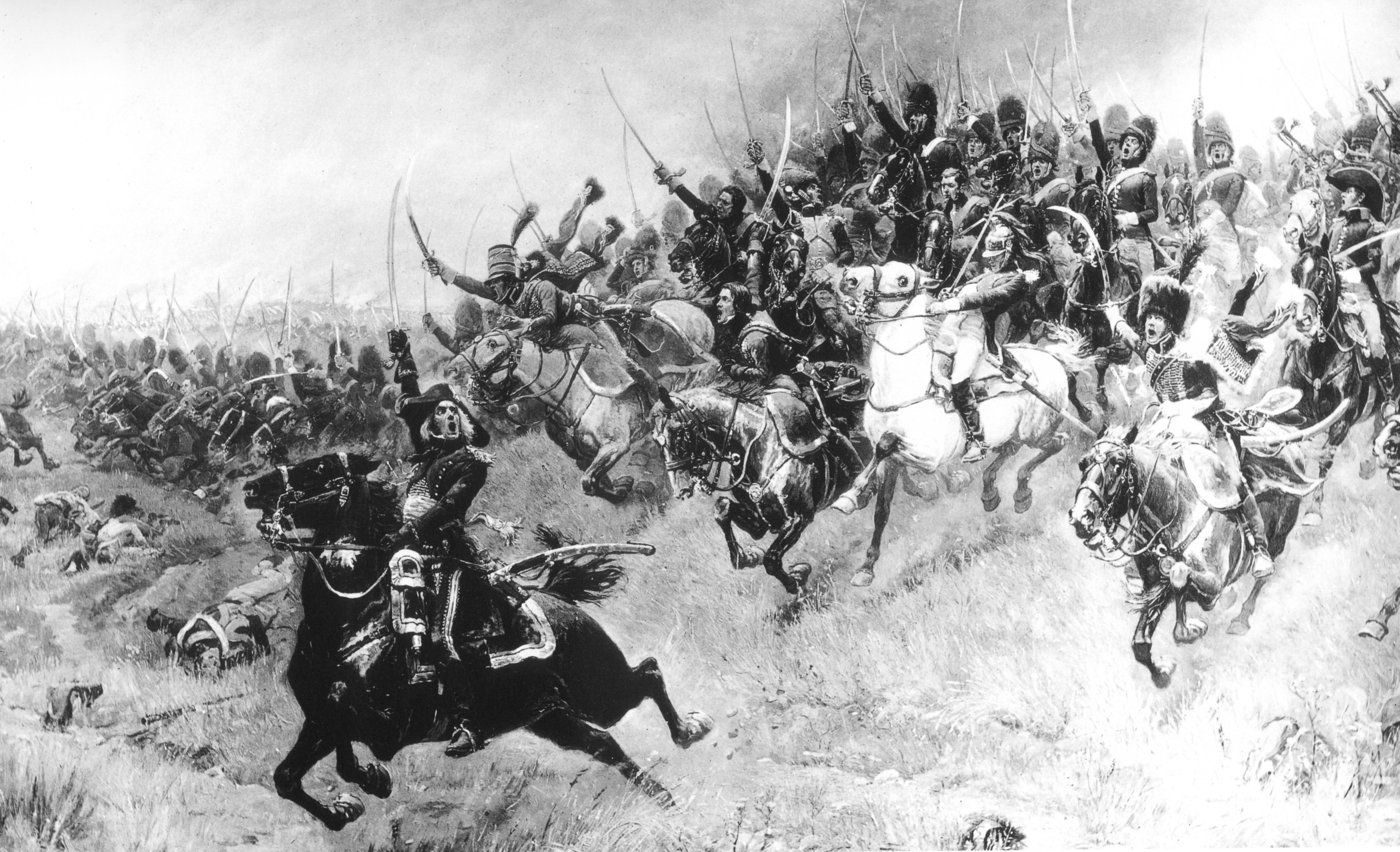 Charge de la cavalerie de la Garde consulaire à Marengo, 14 juin 1800 : les grenadiers à cheval et les chasseurs à cheval menés par Bessières (au premier plan, le sabre dressé) se ruent sur la cavalerie autrichienne.